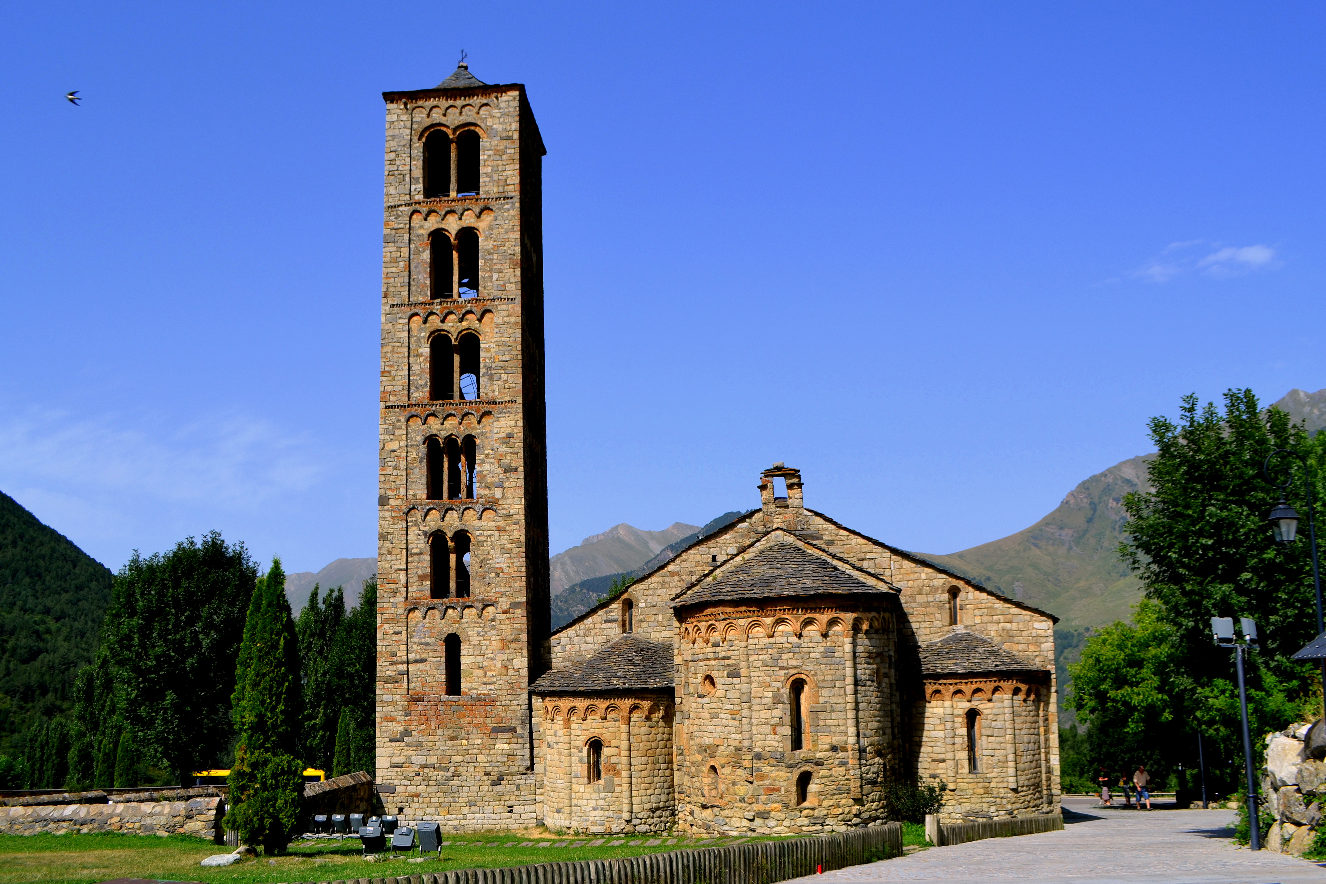 Església de Sant Climent de Taüll (la Vall de Boí)